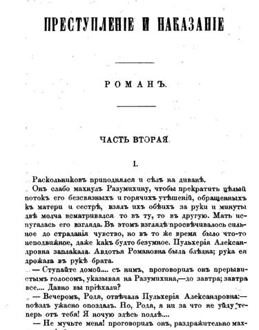 Журнал "Русский вестник", 1866, № 1. Первая публикация романа Ф. М. Достоевского "Преступление и наказание"